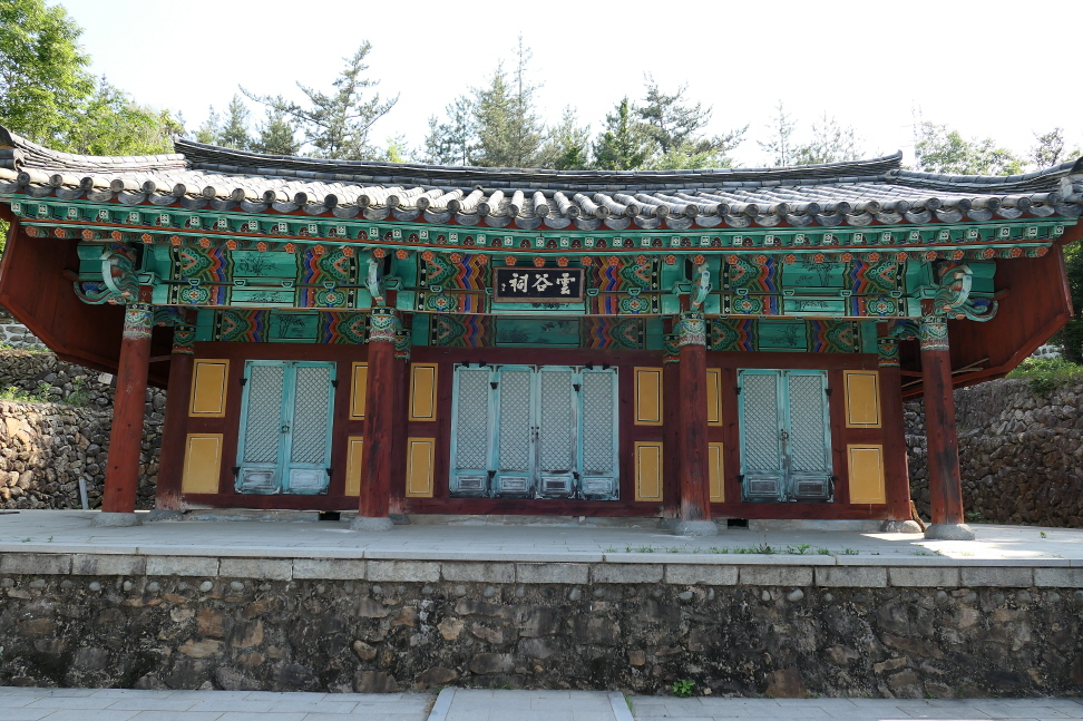 고흥 운곡사